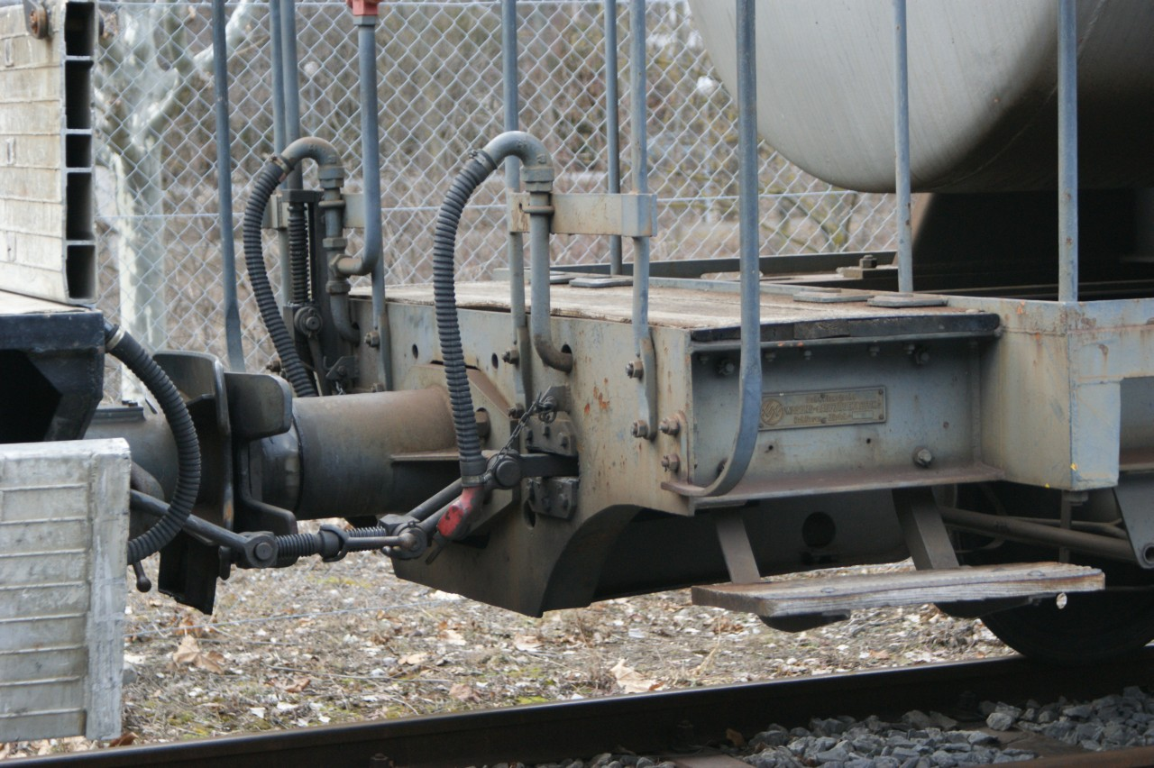 Kesselwagen MGB Uhk 2872 (1948) im Vispsand, gut sichtbar sind die Befestigungsmöglichkeiten für andere Zug- und Stossvorrichtungen